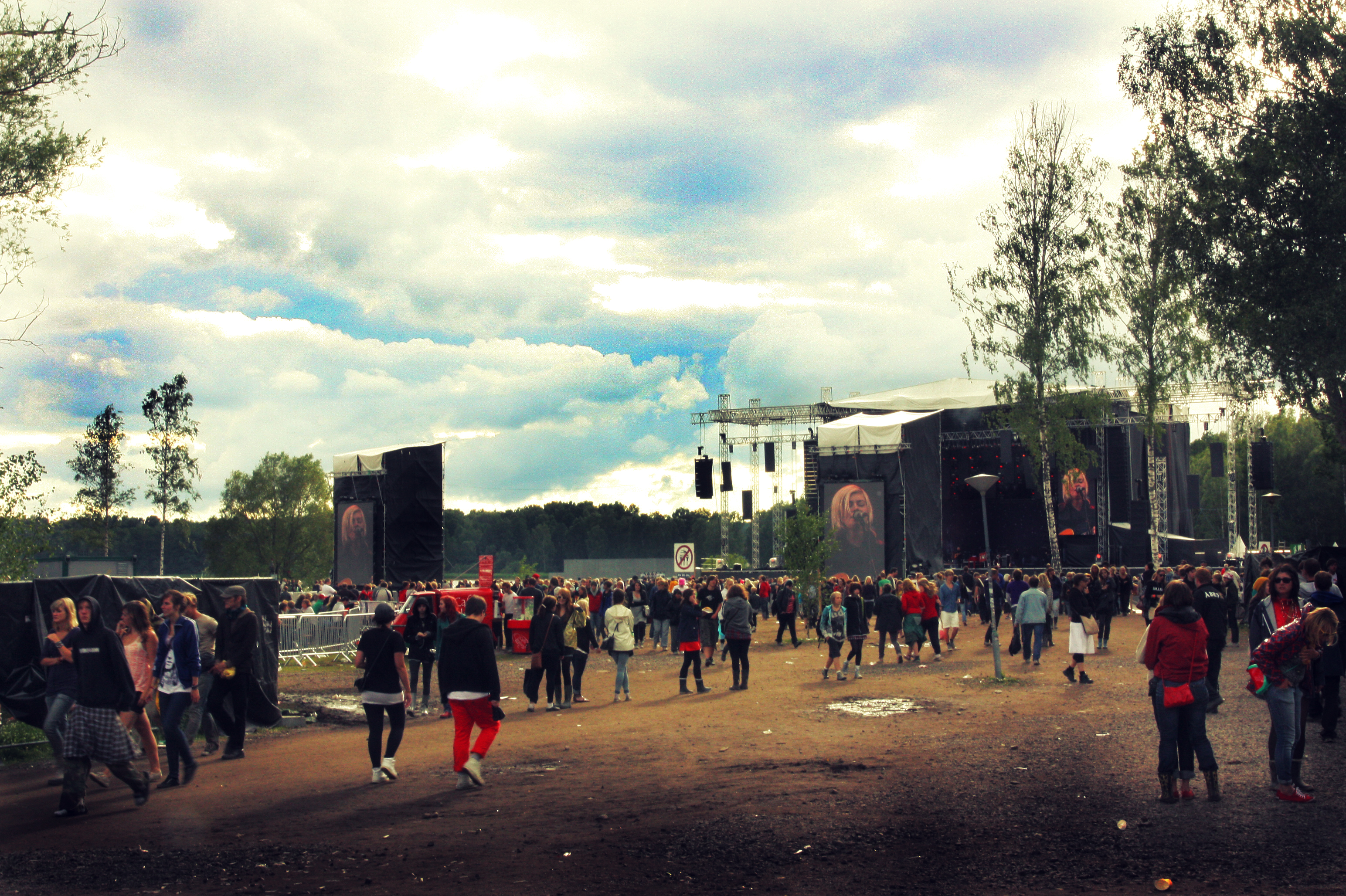 Stage at Hultsfred Festival.